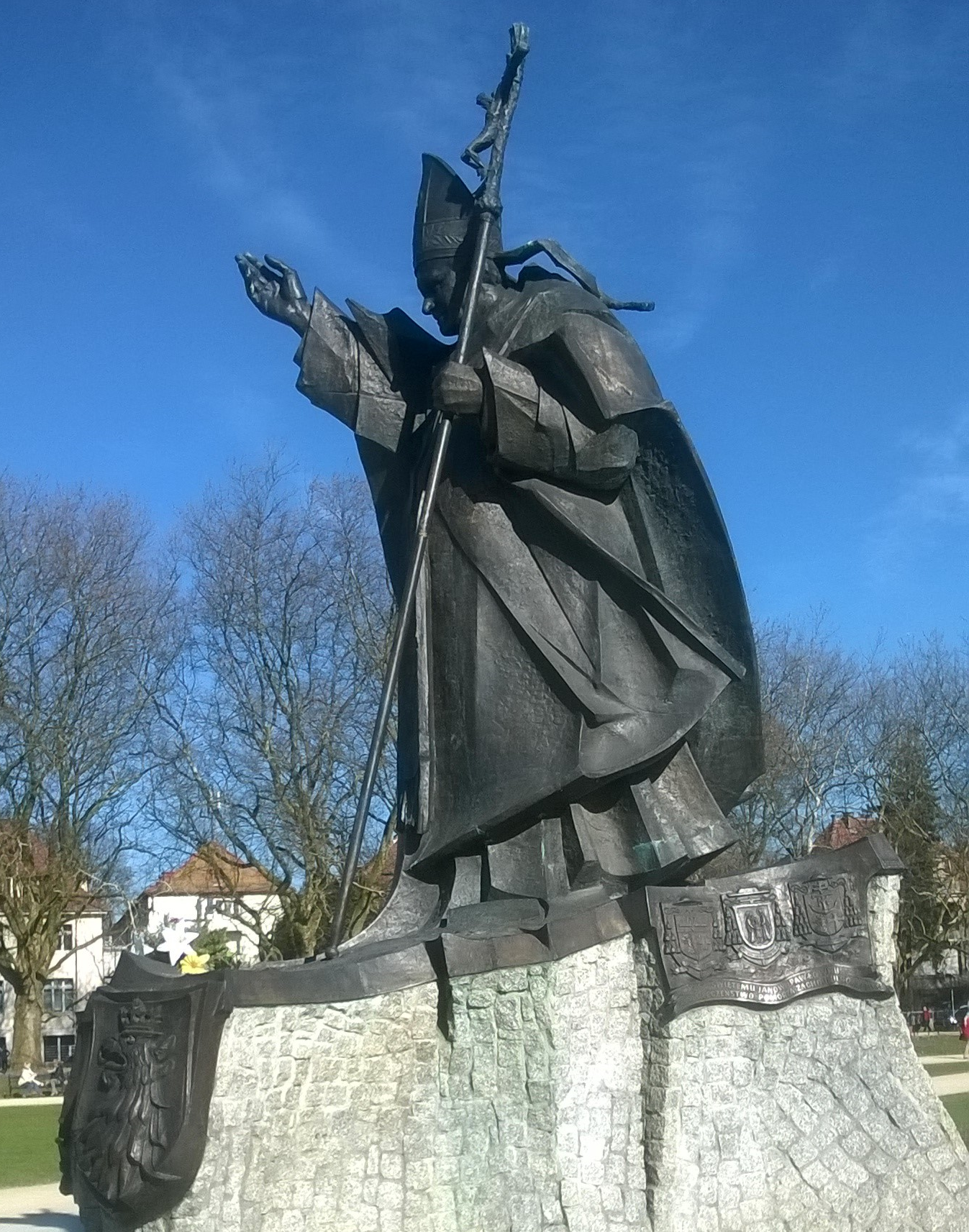 Pomnik Jana Pawła II na Jasnych Błoniach (Szczecin)